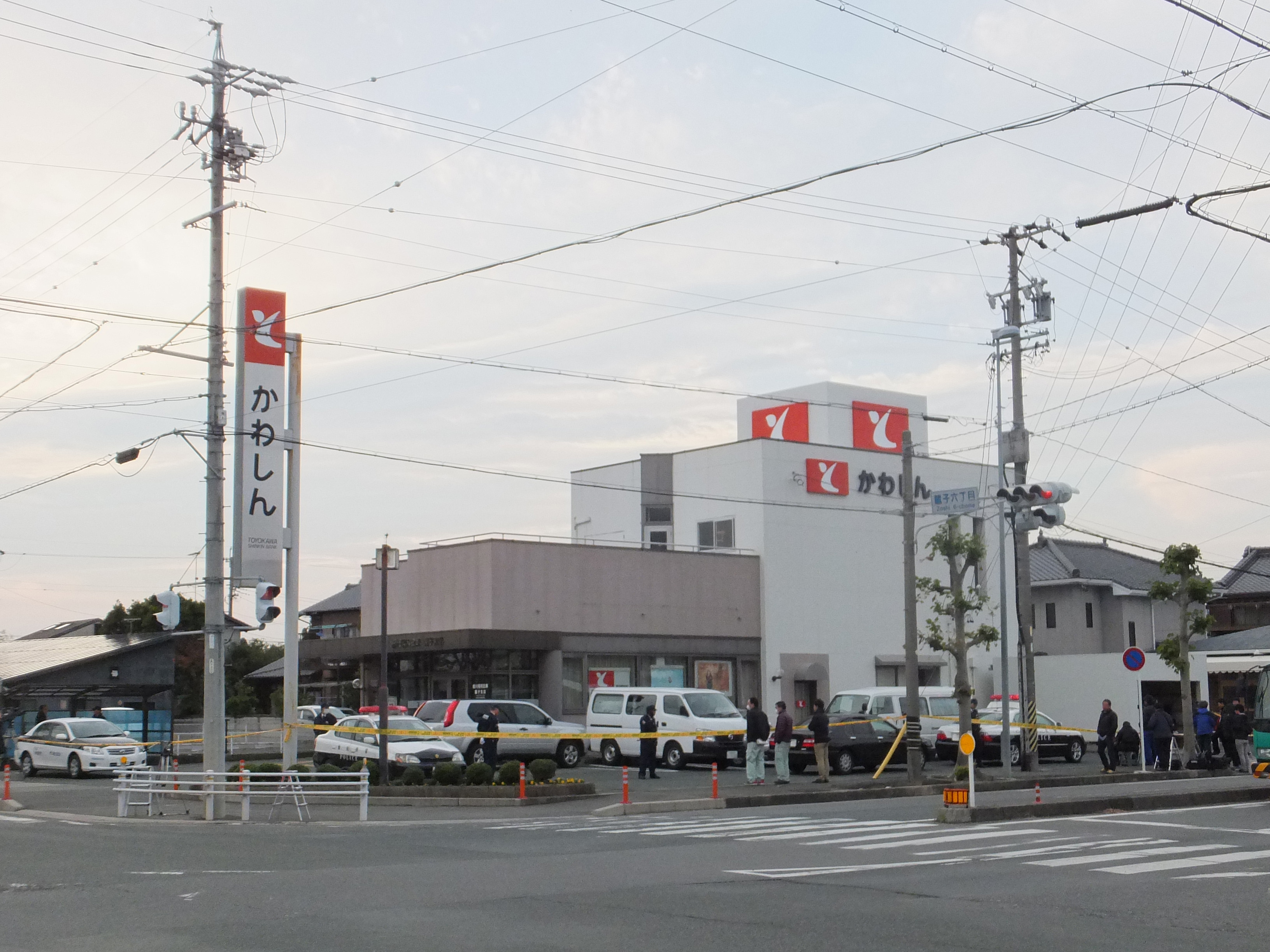 豊川信用金庫蔵子支店。立てこもり事件の犯人が確保（2012年11月23日午前3時過ぎ）されてから半日余り経過